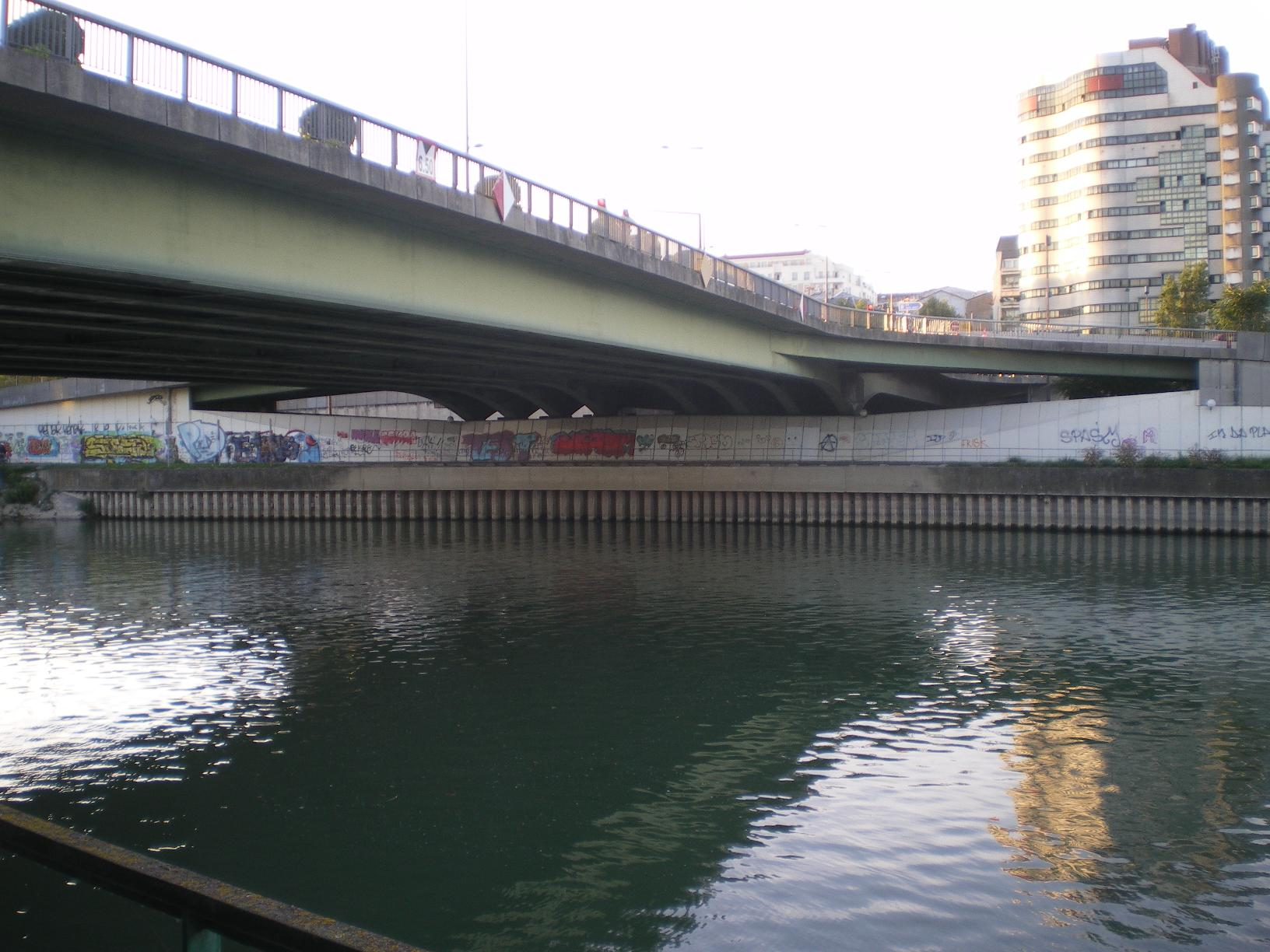 Le pont de Charenton